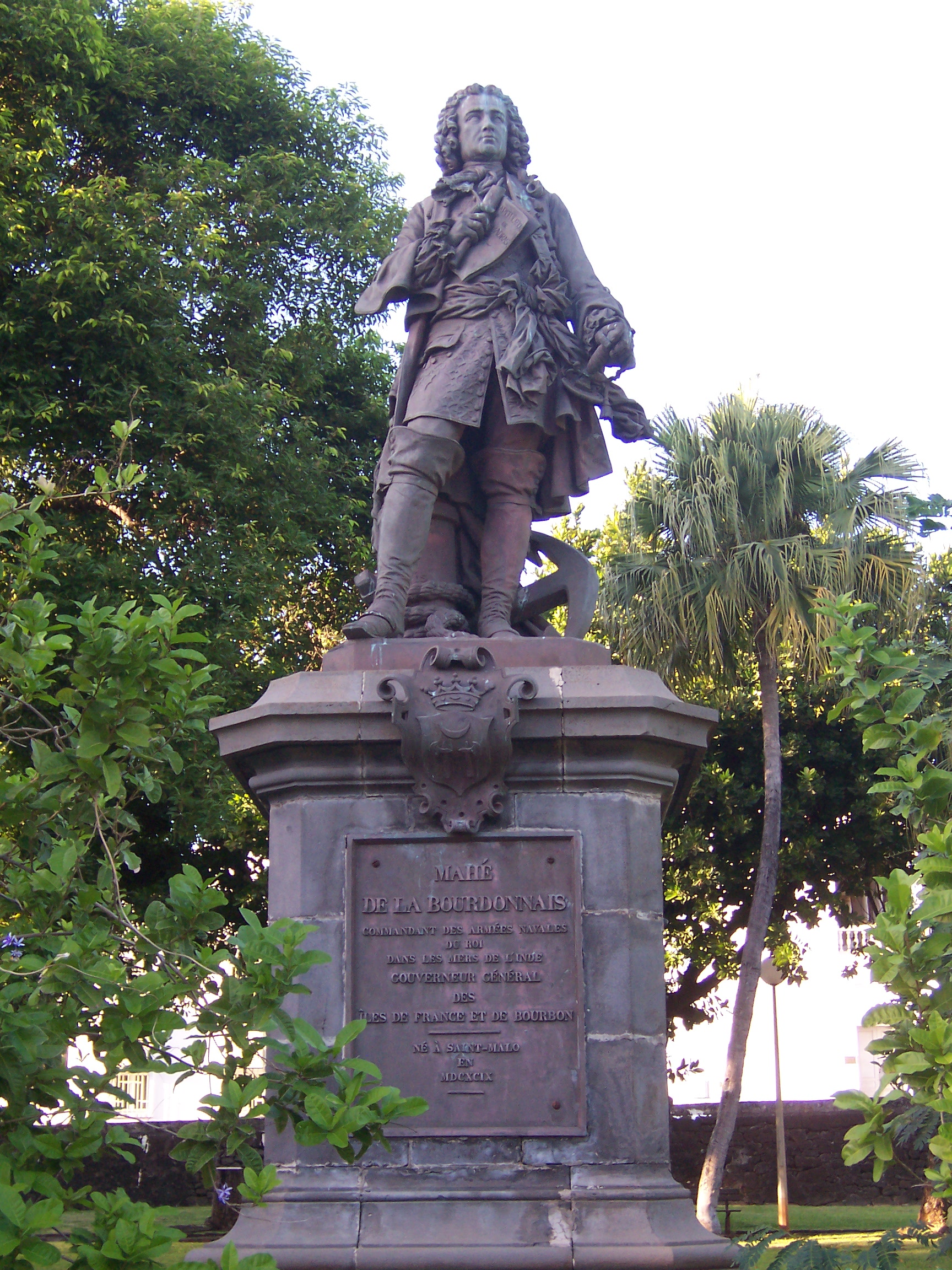 Saint-Denis (Réunion) : the statue of Mahé de La Bourdonnais